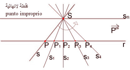 مثلاً, لنعتبر خط r و نقطة S خارجه عنة. بالنقطة. نمرر خط s بحيث يقطع r في نقطة P. بدوران الخط حول هذه النقطة S , نقطة تقاطع بين الخطين سوف تنتقل تدريجيا إلى مواقع ابعد (بالنسبة للنقطة S ) حتى الحالة التي يكون فيها الخط s مواز للخط ص . في هذة الحالة, نقطة التقاطع سوف تكون لا نهاية والتي تمثل اتجاه الخط r والخطوط الموازية له.